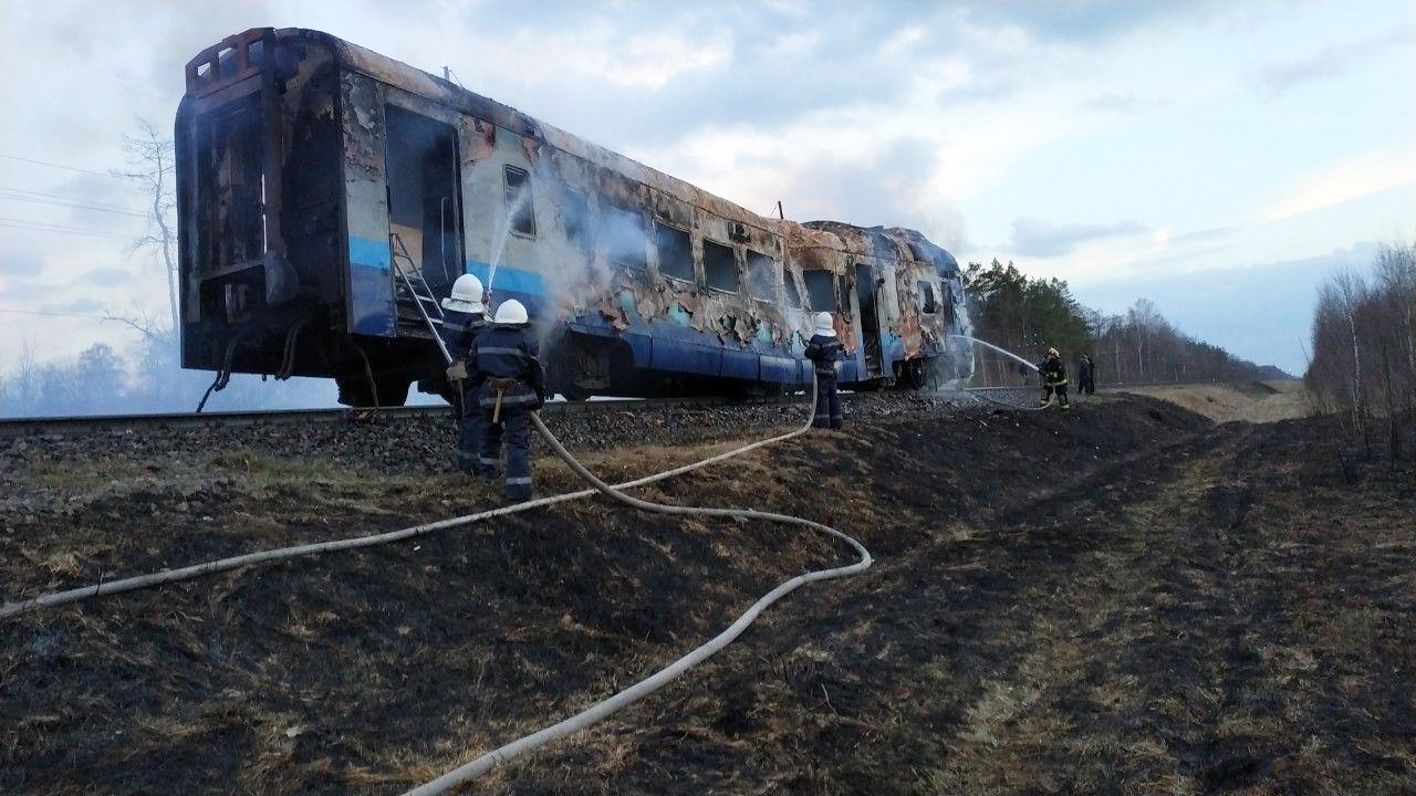 Вагон Д1 657-3, который сгорел 5 марта 2019 возле станции Немовичи.